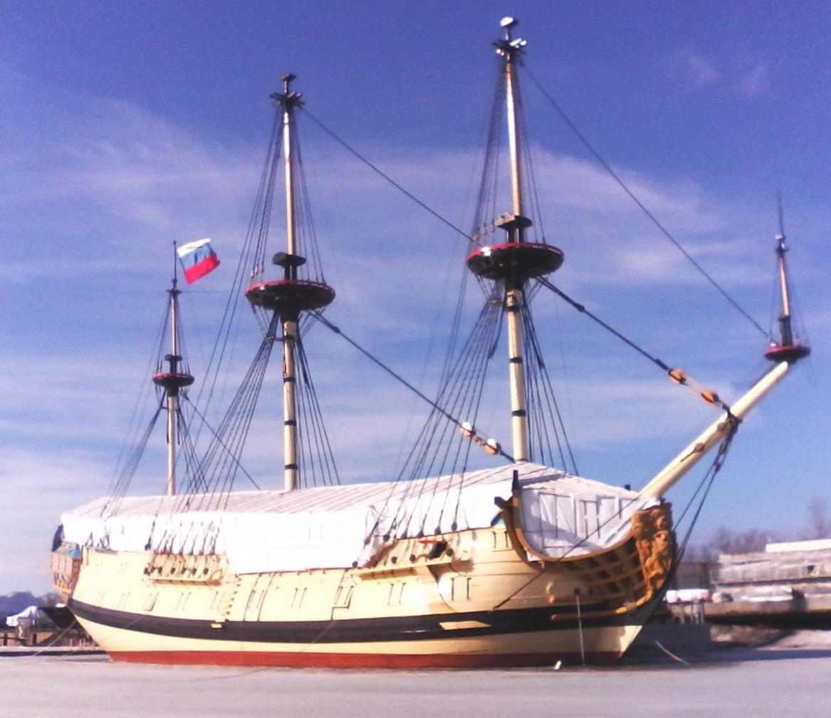 Полноразмерная копия линейного корабля "Полтава". Санкт-Петербург, яхт-клуб "Геркулес", март 2019 года.